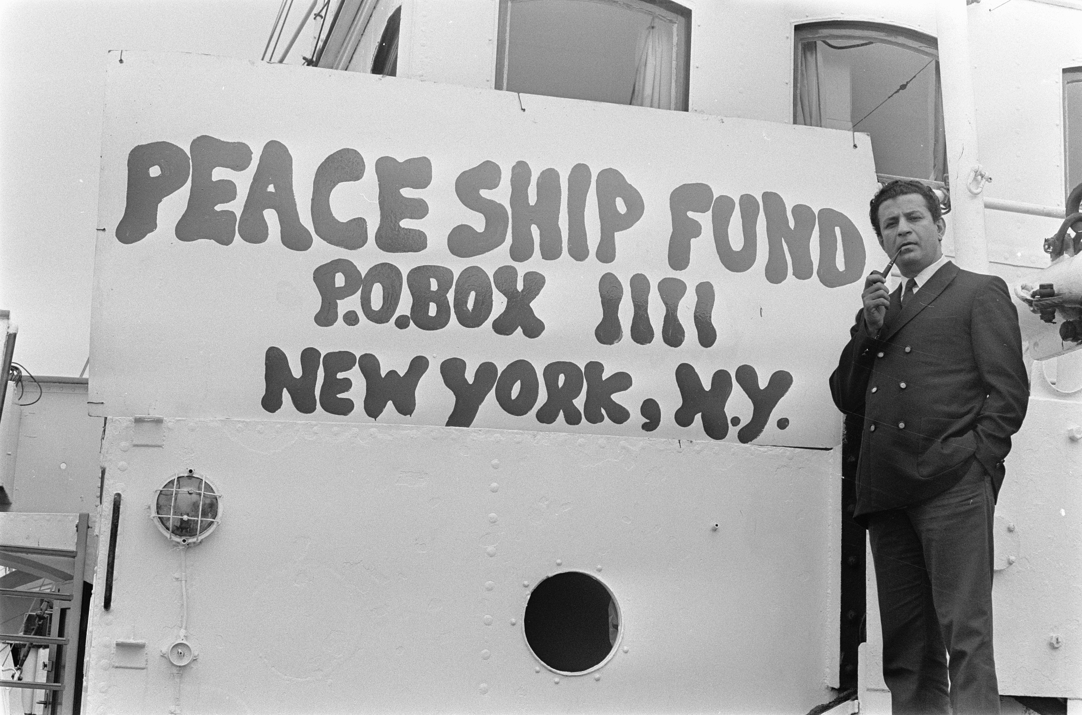 Collectie / Archief : Fotocollectie Anefo Reportage / Serie : Het schip van de Israëlische vredesactivist Abie Nathan in de haven van Amsterdam Beschrijving : Abie Nathan op zijn schip naast de tekst "Peace Ship Fund" Datum : 18 juli 1969 Locatie : Amsterdam, Noord-Holland Trefwoorden : havens, schepen Persoonsnaam : Nathan, Abie Fotograaf : Fotograaf Onbekend / Anefo Auteursrechthebbende : Nationaal Archief Materiaalsoort : Negatief (zwart/wit) Nummer archiefinventaris : bekijk toegang 2.24.01.05 Bestanddeelnummer : 922-6413